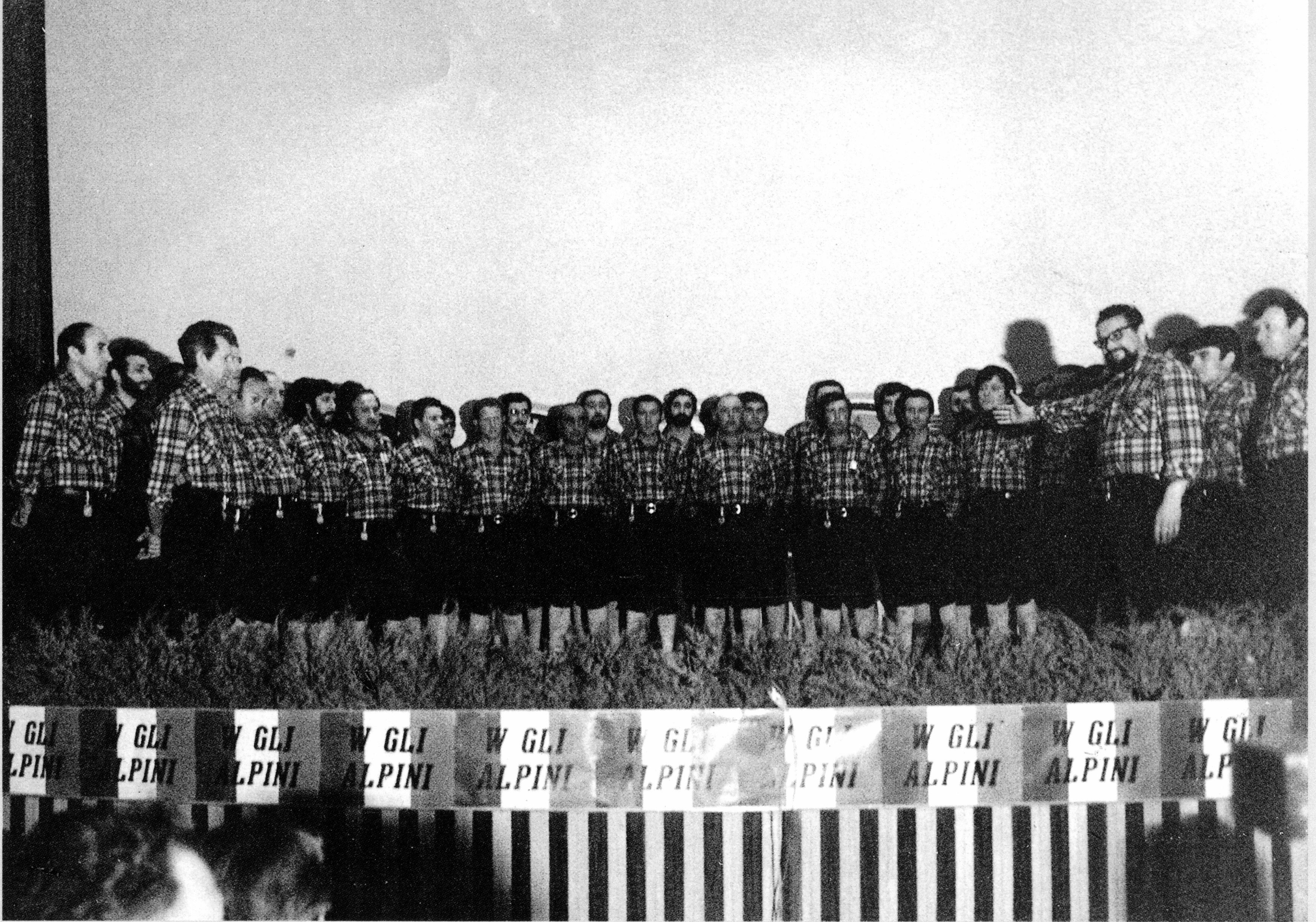 Prima esibizione del Coro El Castel nel 1974